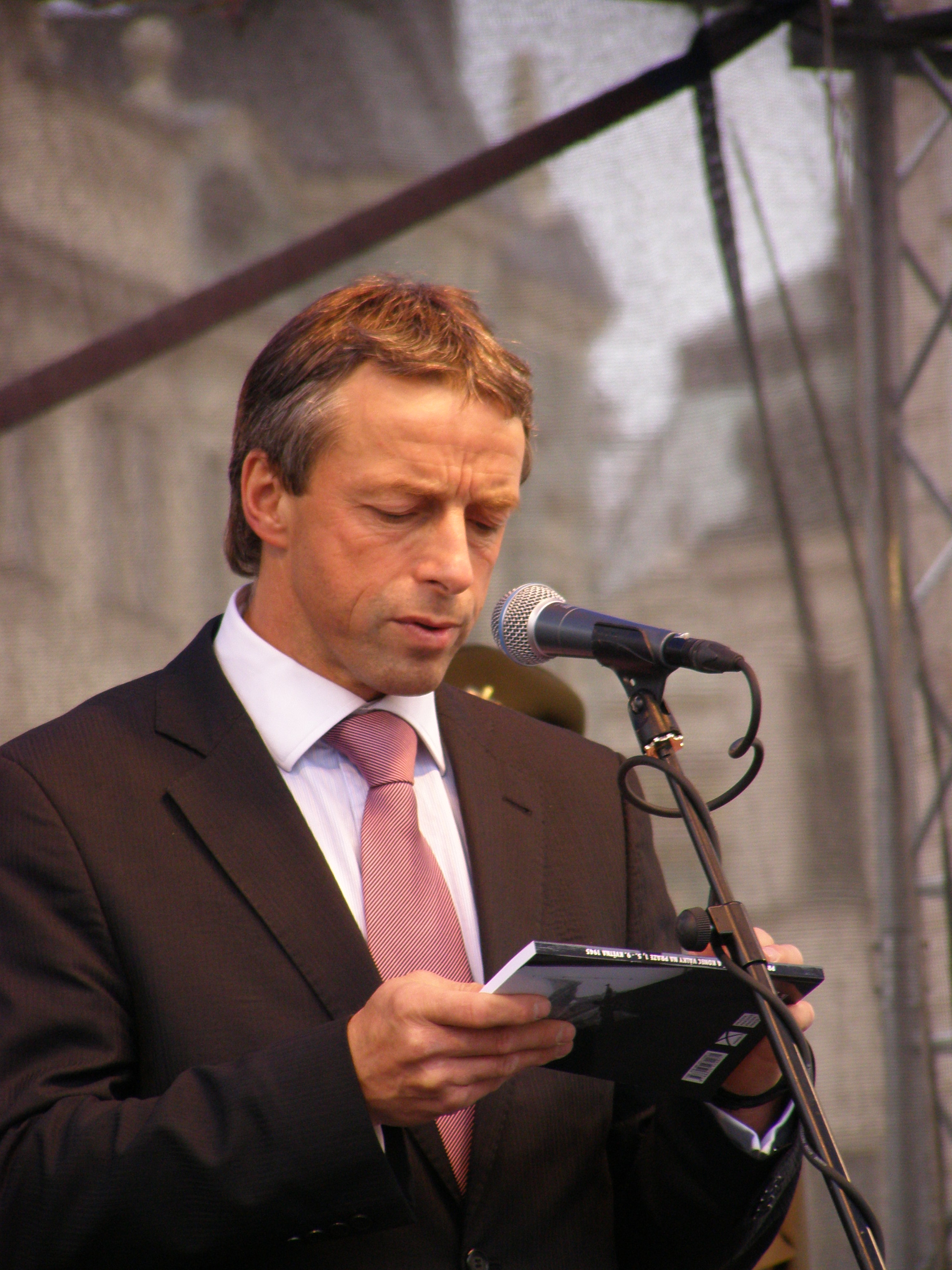 Praha, Staré Město, Staroměstské náměstí, oslavy 65 let od konce války v Evropě, Pavel Bém